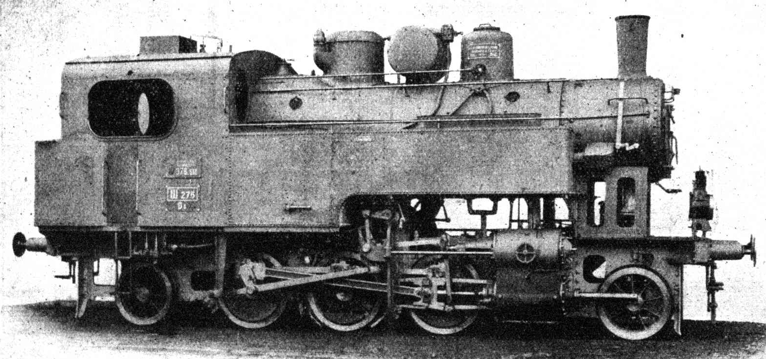 A MÁV 376 sorozatú mozdonya Brotán-kazános, iker-túlhevítős kivitelben